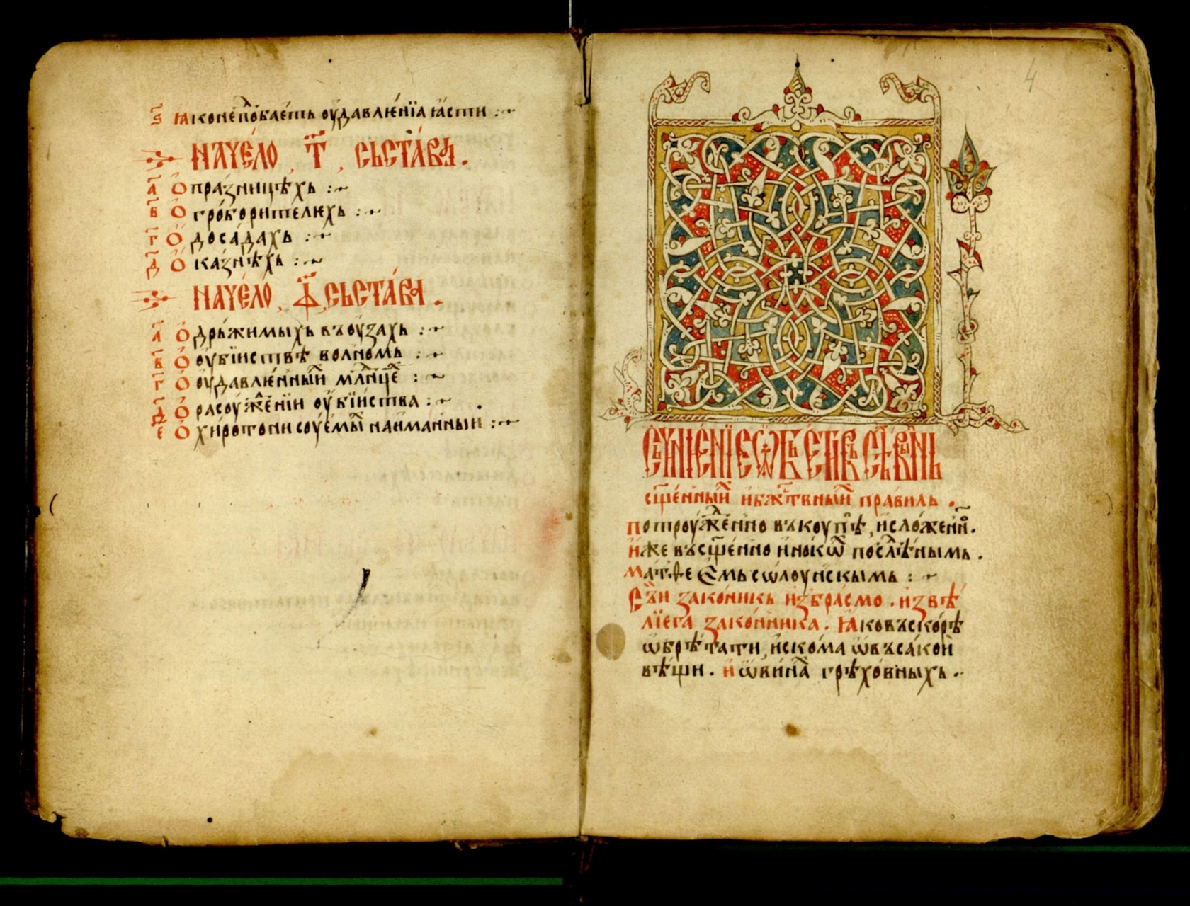 Dušan's Code, Prizren Manuscript